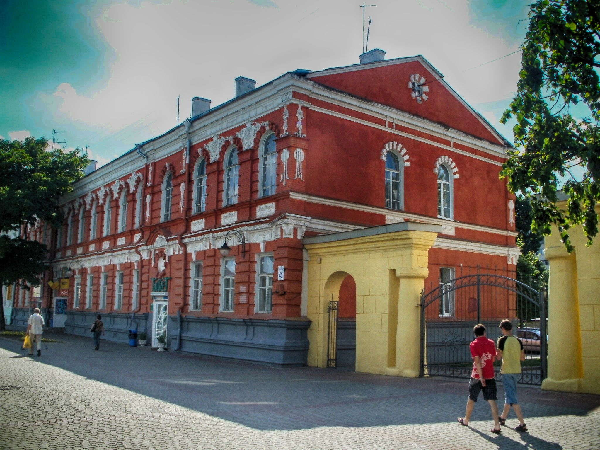 Беларуская (тарашкевіца): Магілеў, вуліца Ленінская (былая Ветраная) і яе забудова